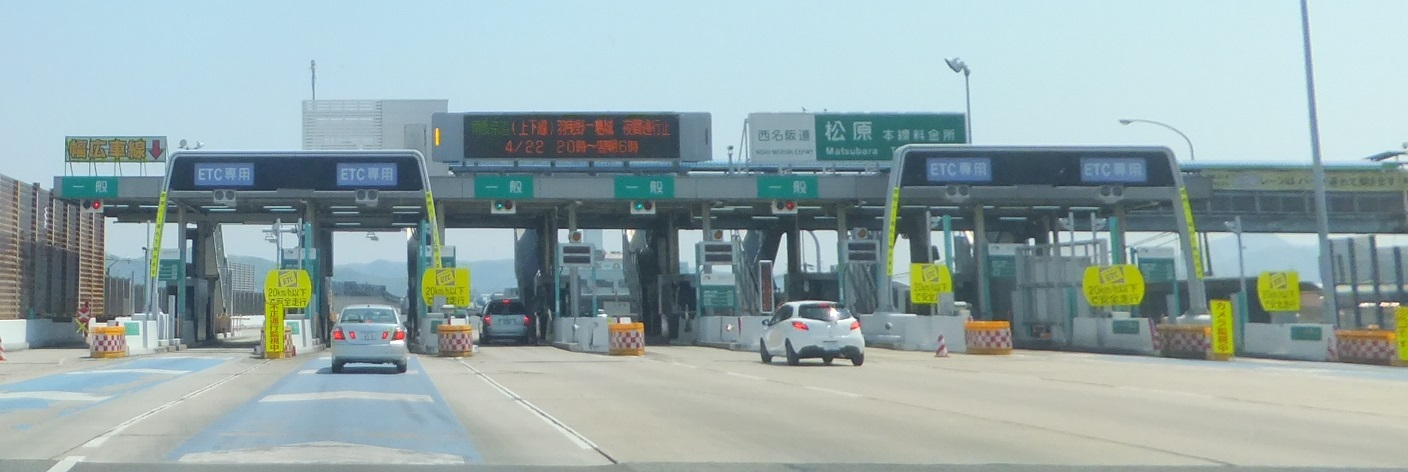 松原本線料金所